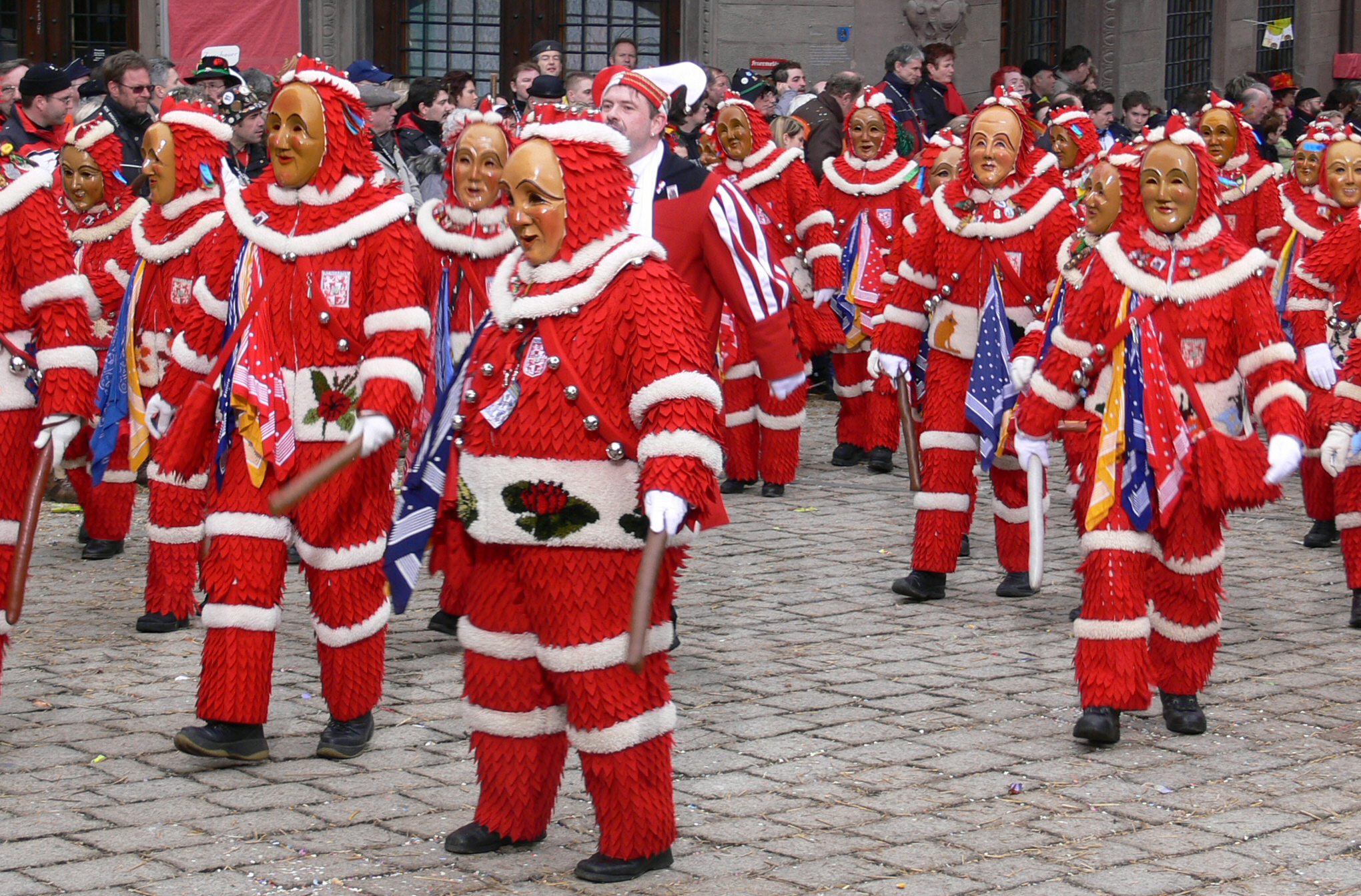 Plätzlerzunft Weingarten, Figur: (Roter) Plätzler Veranstaltung: Narrensprung beim Narrentreffen Meßkirch 2006